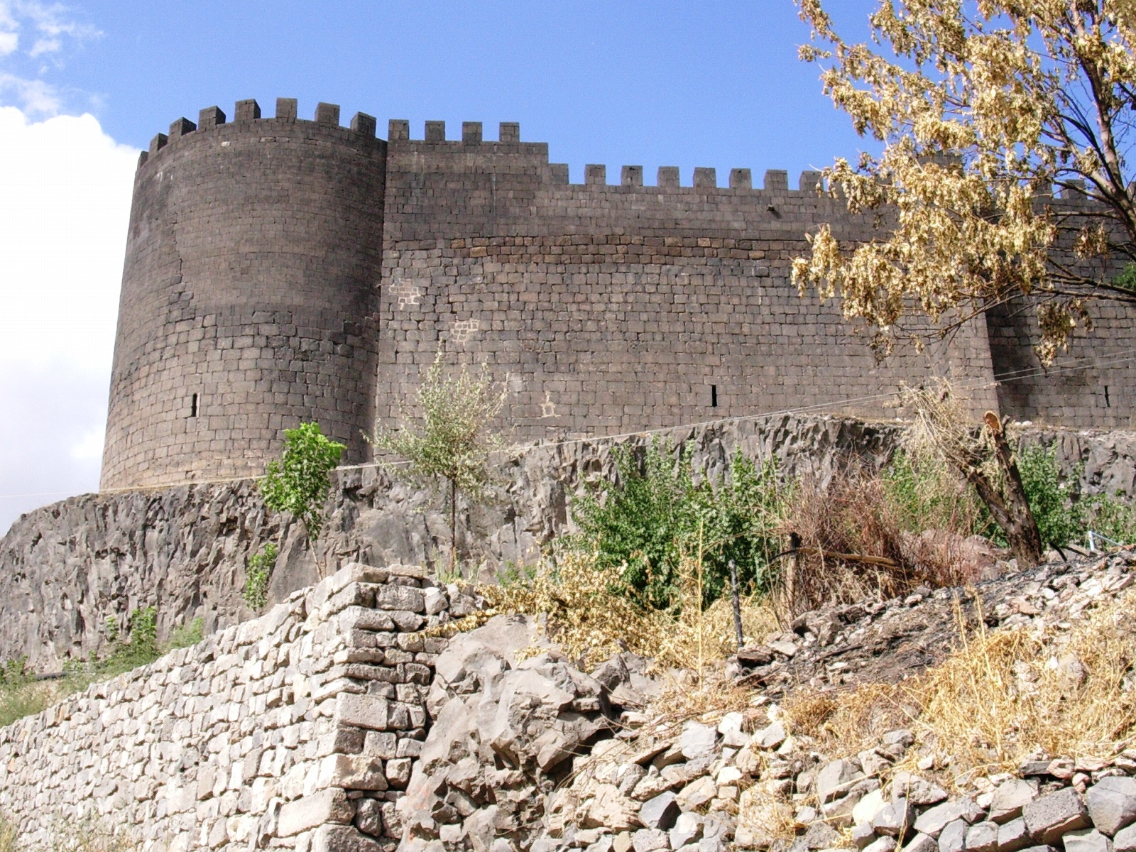 Walls of Diyarbakir